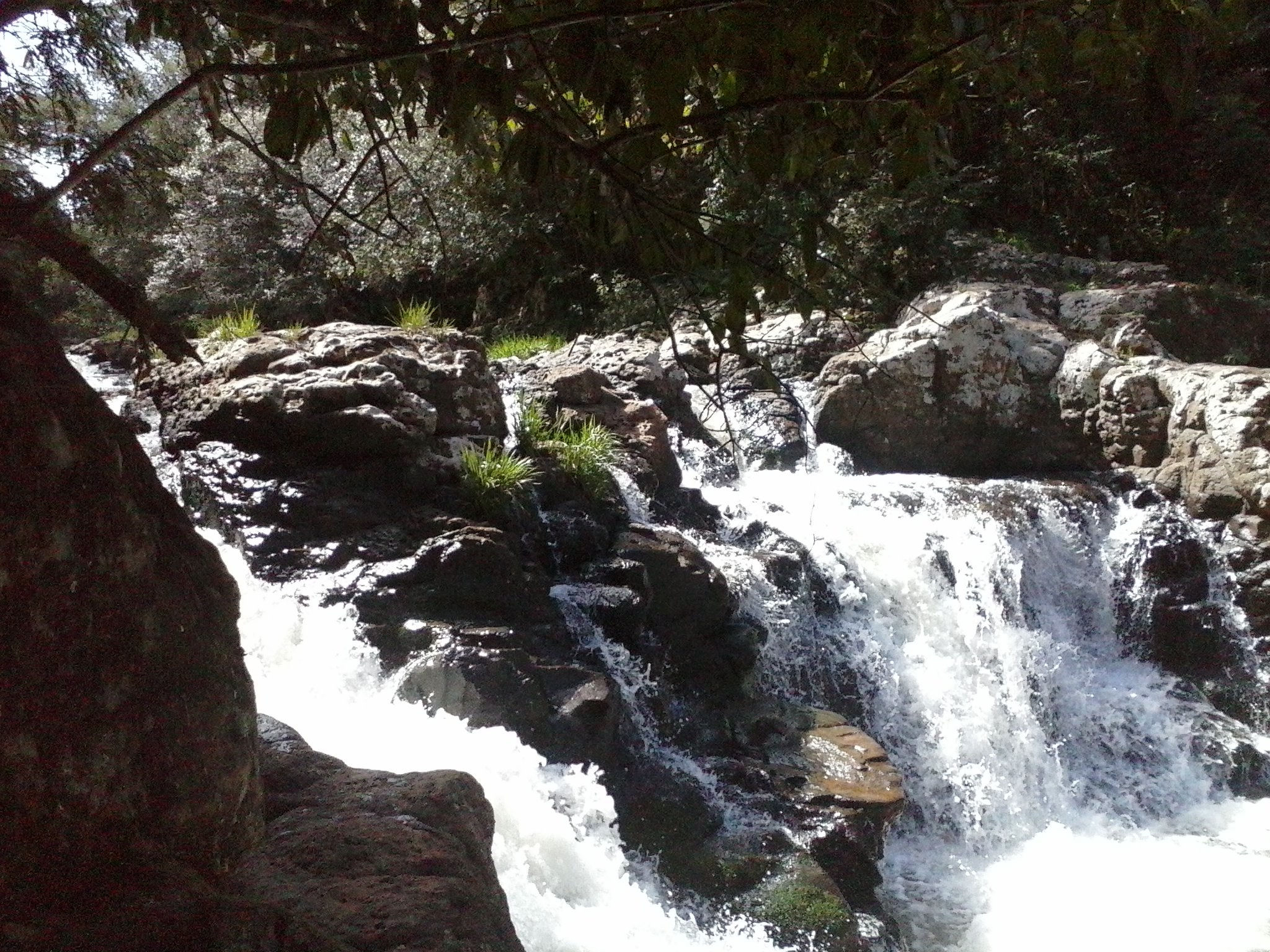 Cachoeira localizada na Linha São Domingos